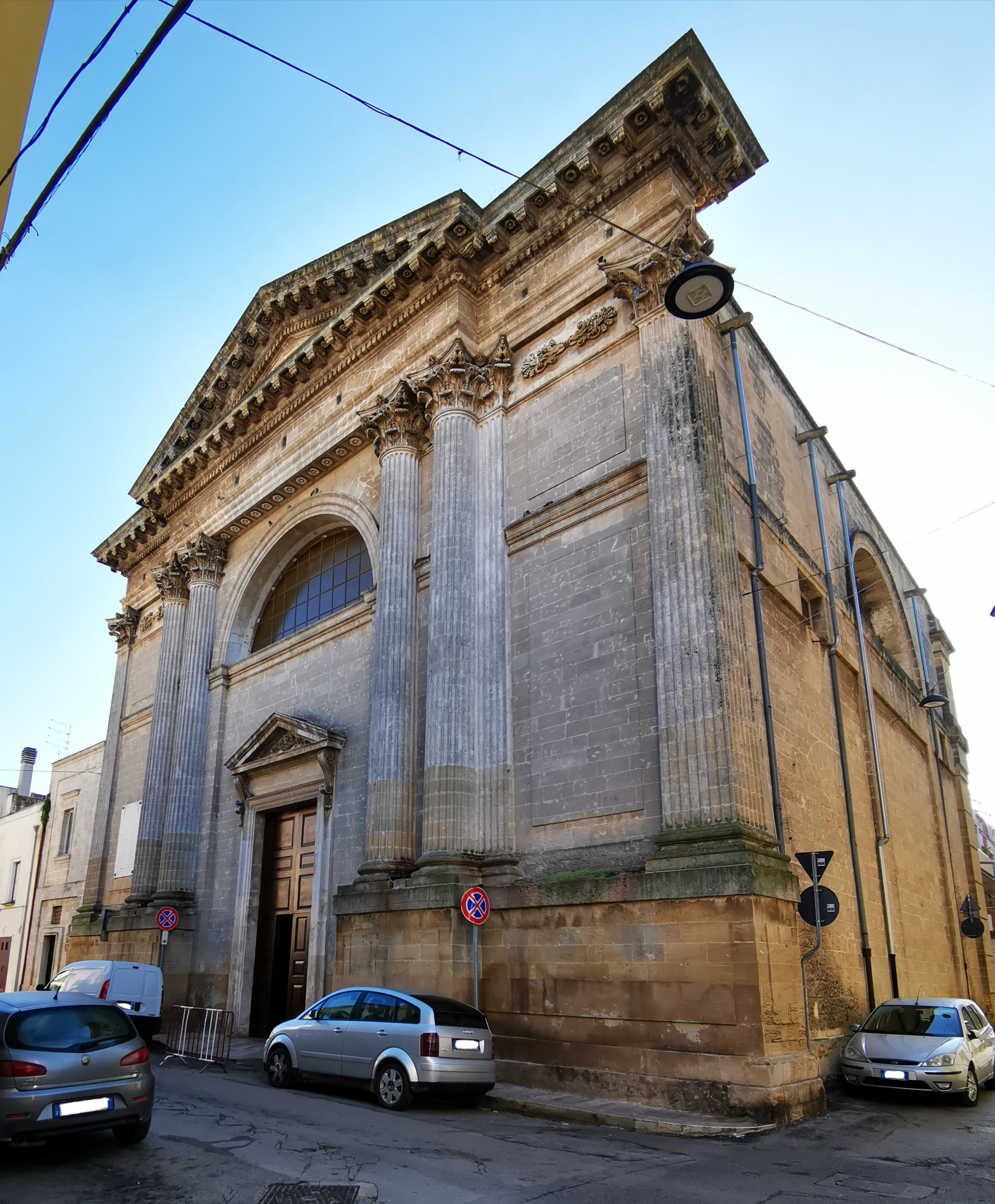 Chiesa dell'Immacolata